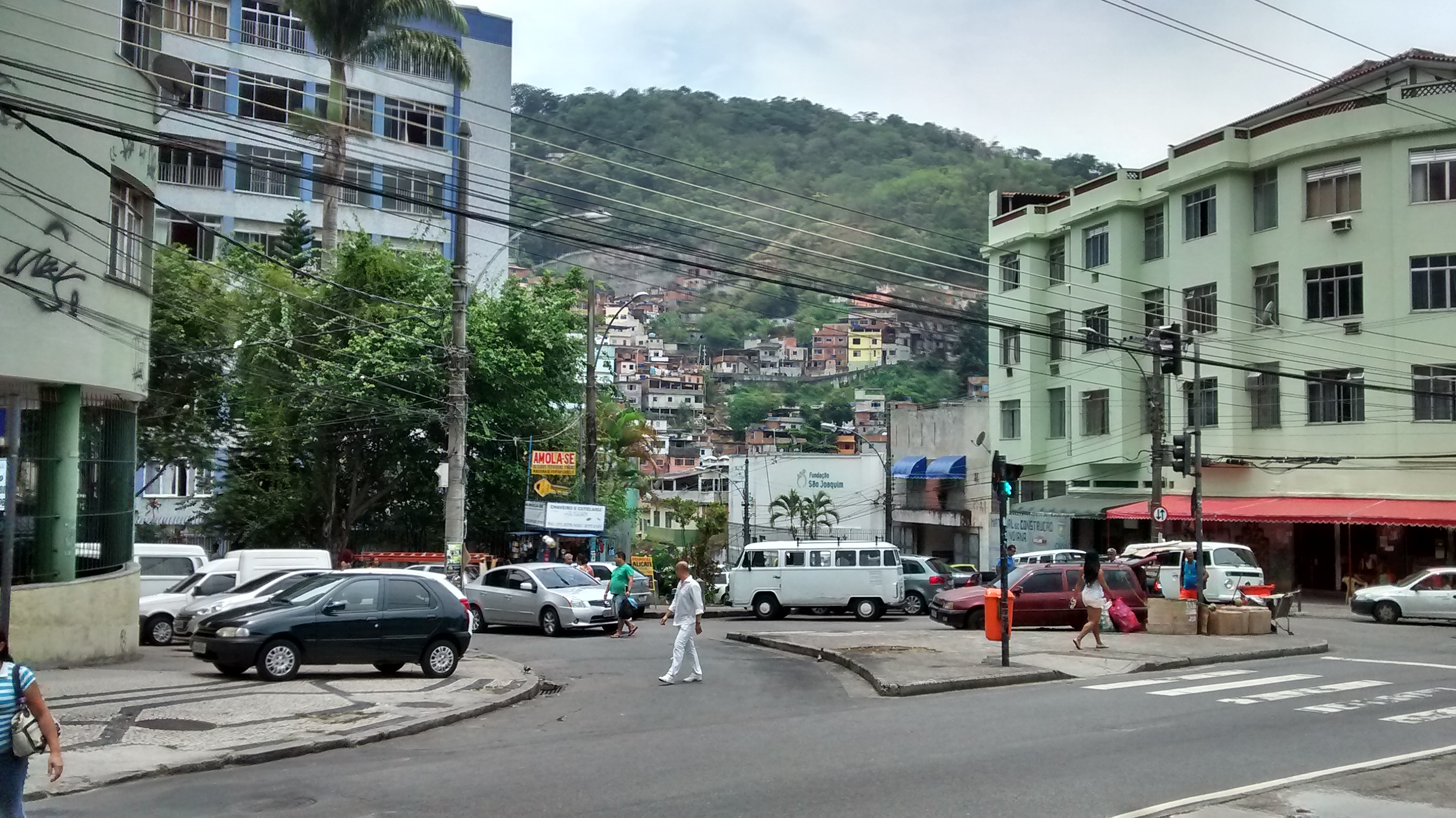 Vista do Morro do Borel, na Tijuca, Rio de Janeiro.